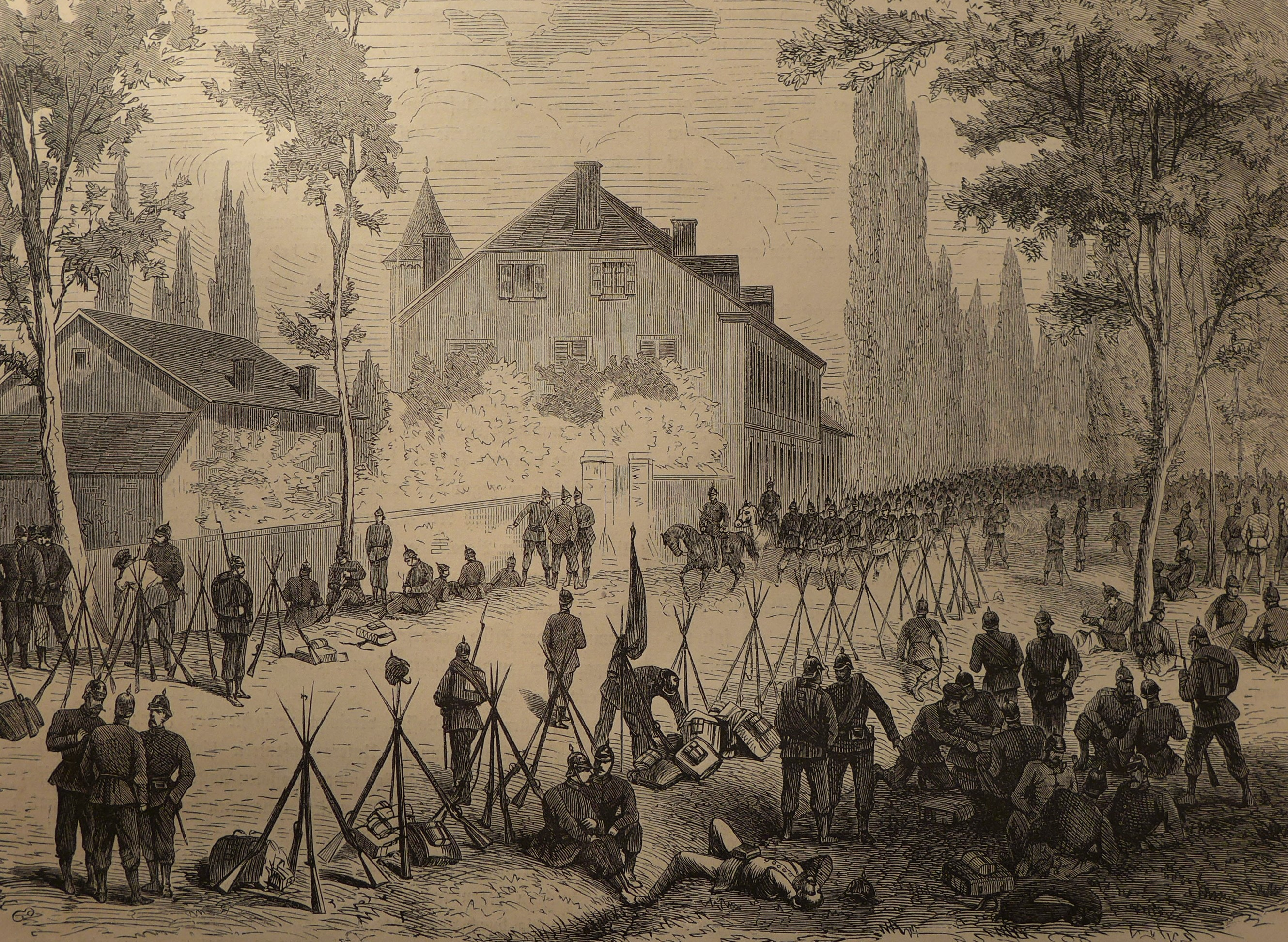 Goldene Bremm am 7. August 1870 (Illustrierte Kriegschronik, Gedenkbuch an den Deutsch-Französischen Feldzug von 1870-1871, Leipzig 1871, S. 92)